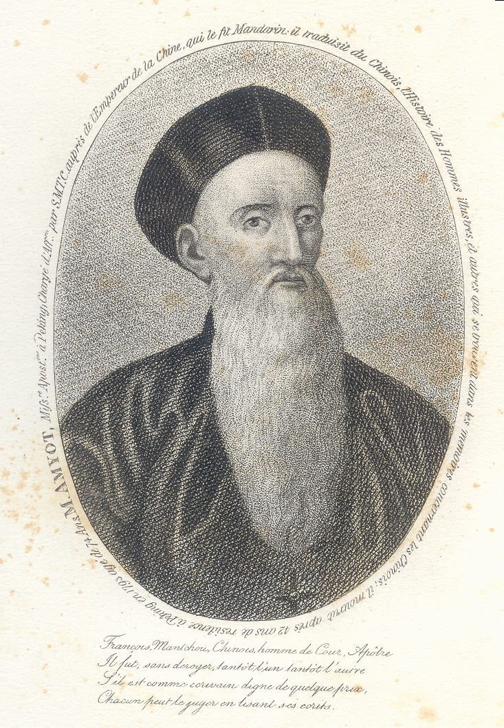 Joseph Marie Amiot, dernier jésuite en Chine.